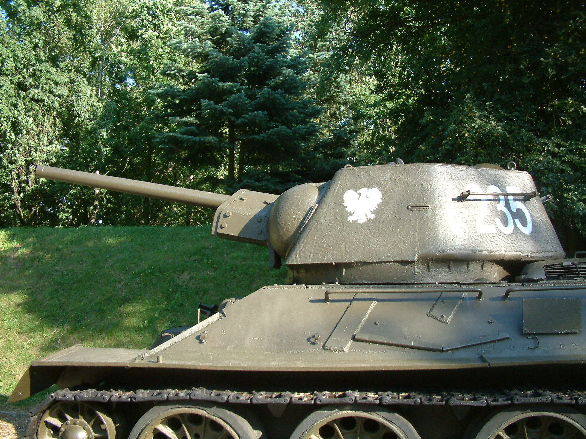 T-34/76 model 1943, Fort Winiary, Poznań